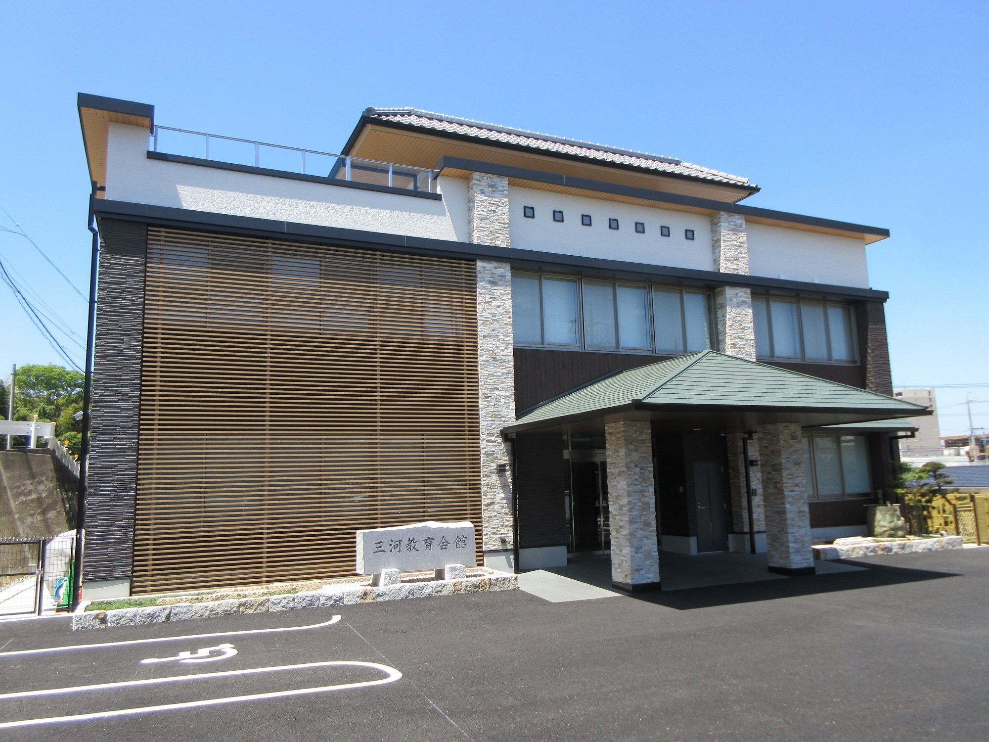 三河教育会館（岡崎市明大寺町）